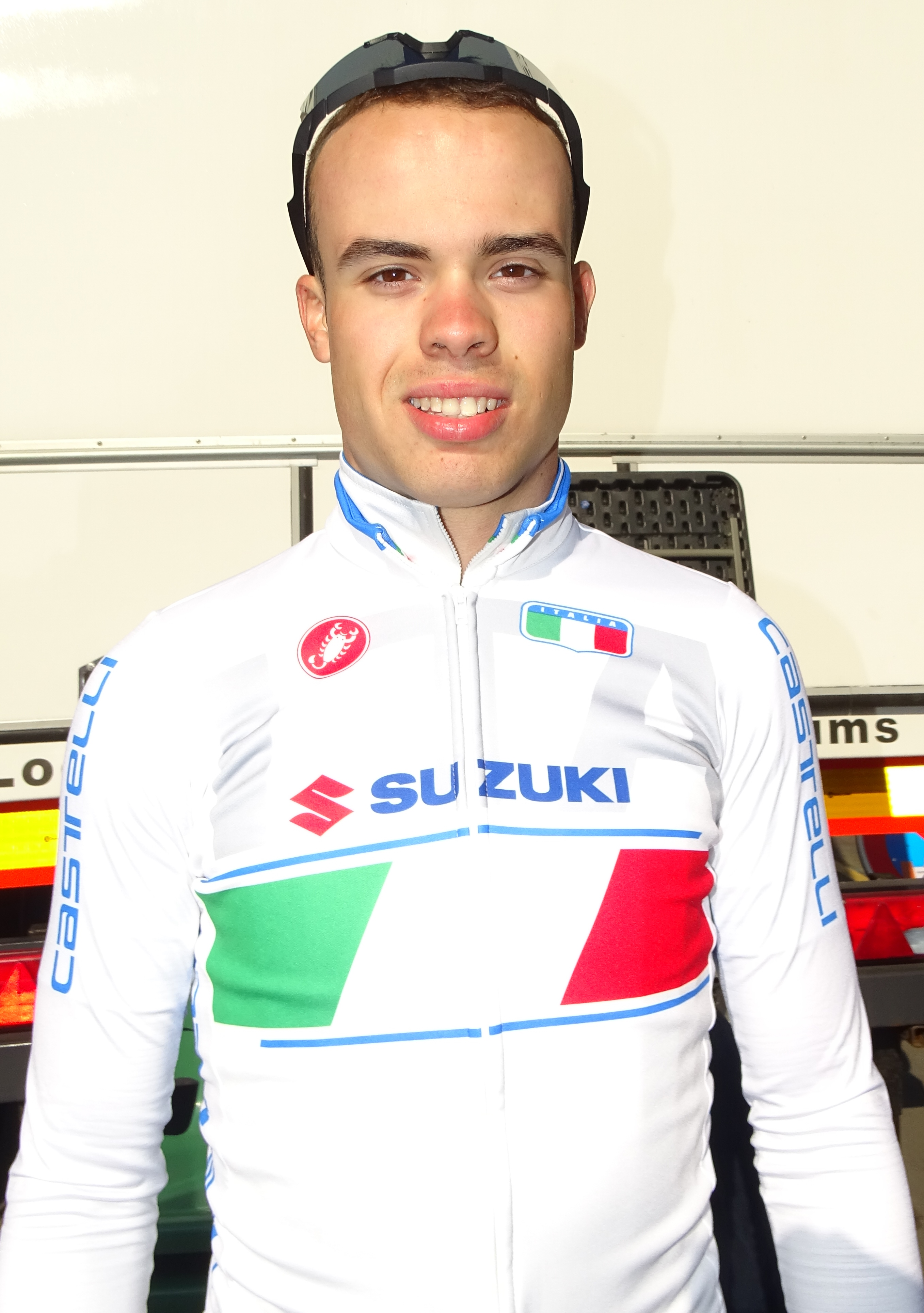 Reportage réalisé le dimanche 9 avril à l'occasion du départ du Paris-Roubaix juniors 2017 à Saint-Amand-les-Eaux, France.